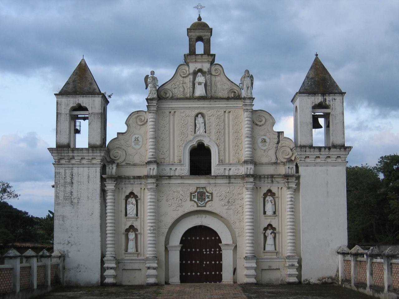 Iglesia de la Merced, Gracias, Lempira, Honduras (1700-1750).